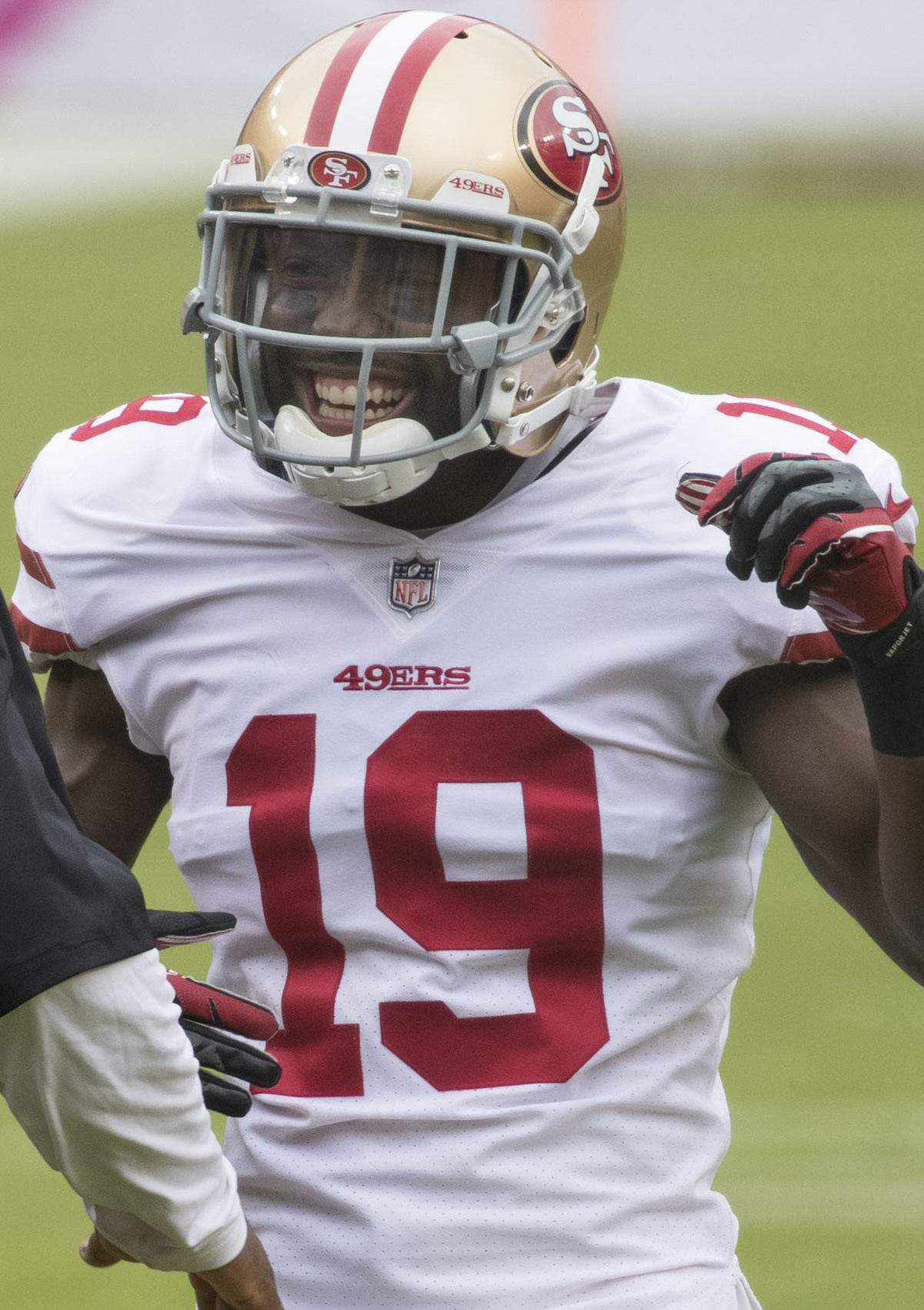 49ers at Redskins 10/15/17